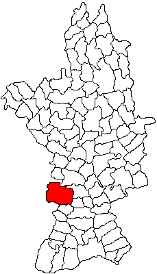 Categorie:Hărţi ale judeţului Olt